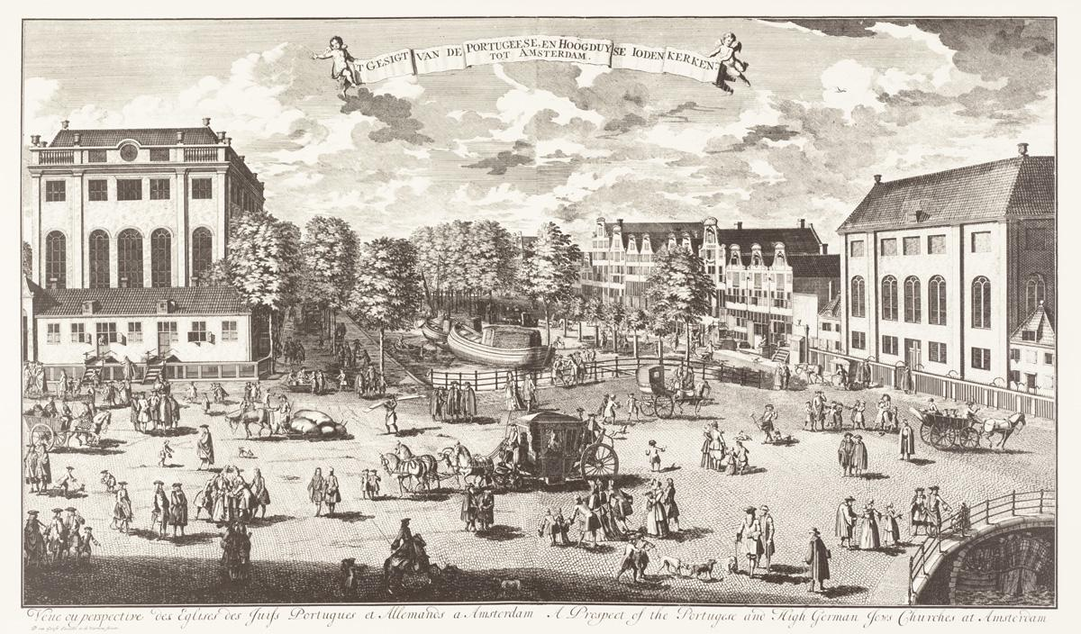 מבט על הרחבה בין בית הכנסת הפורטוגזי באמסטרדם לבין בית הכנסת הגדול באמסטרדם